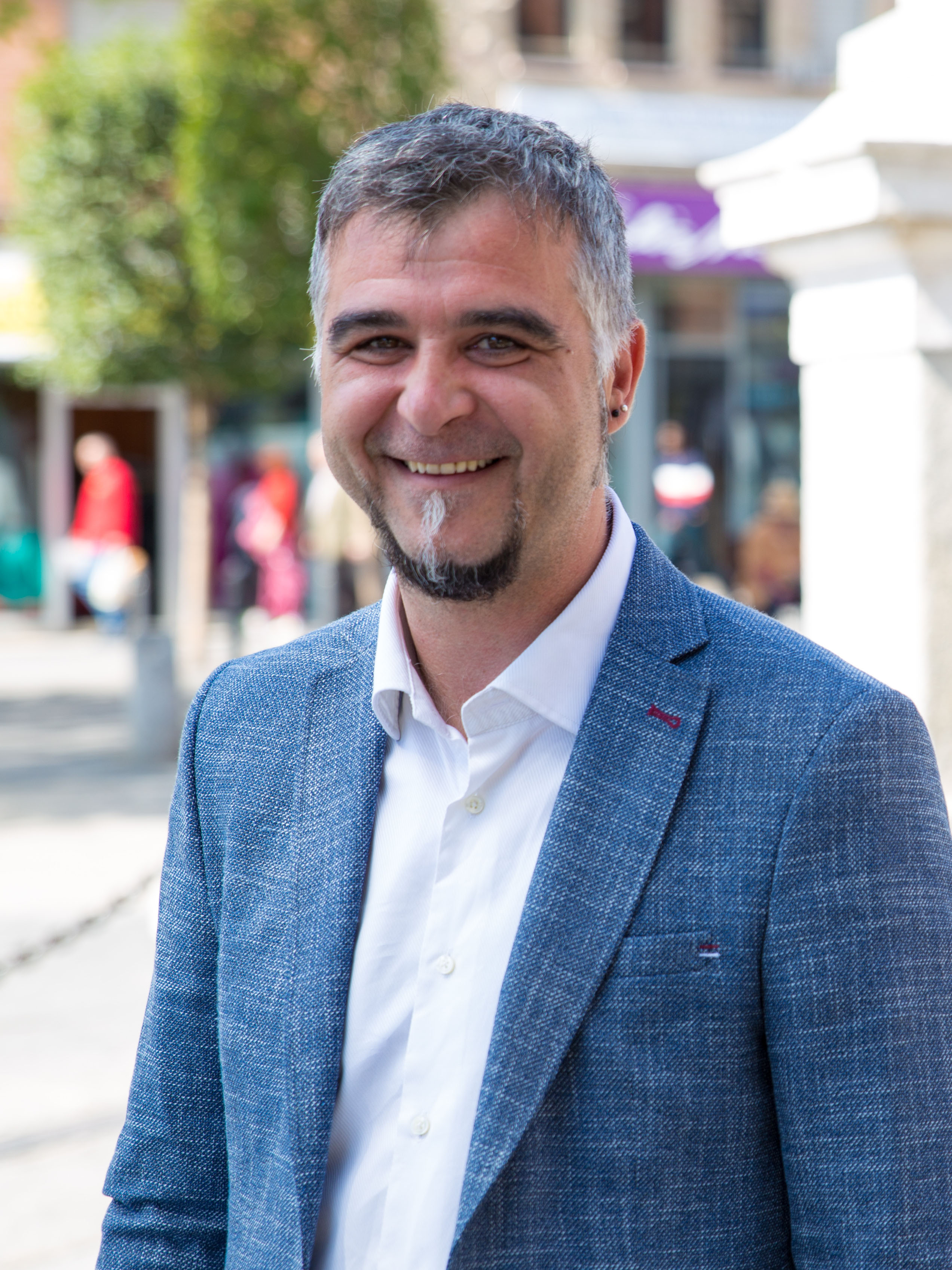 Gabriel Ortega en 2019